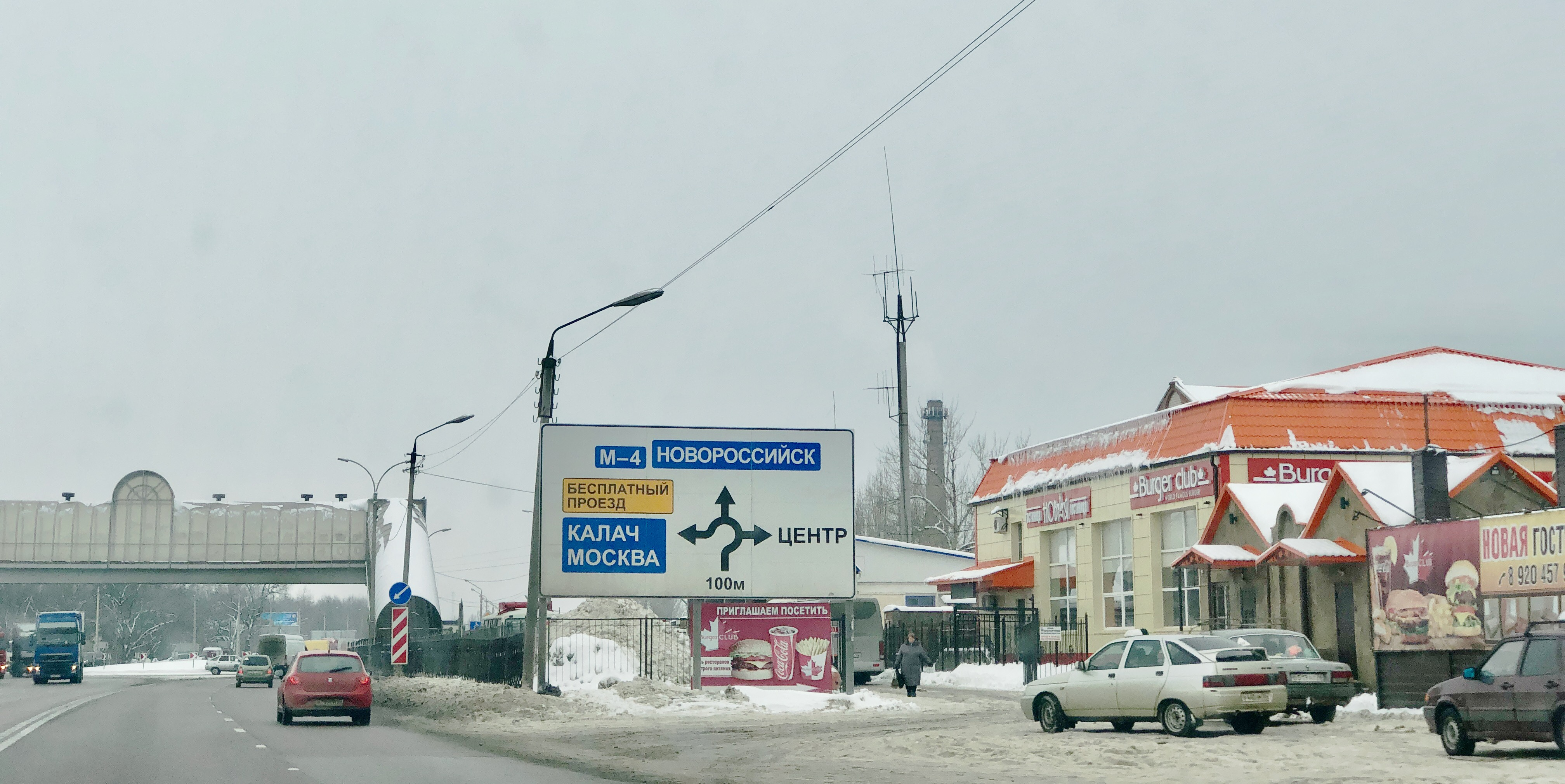 М4 Дон Павловский район